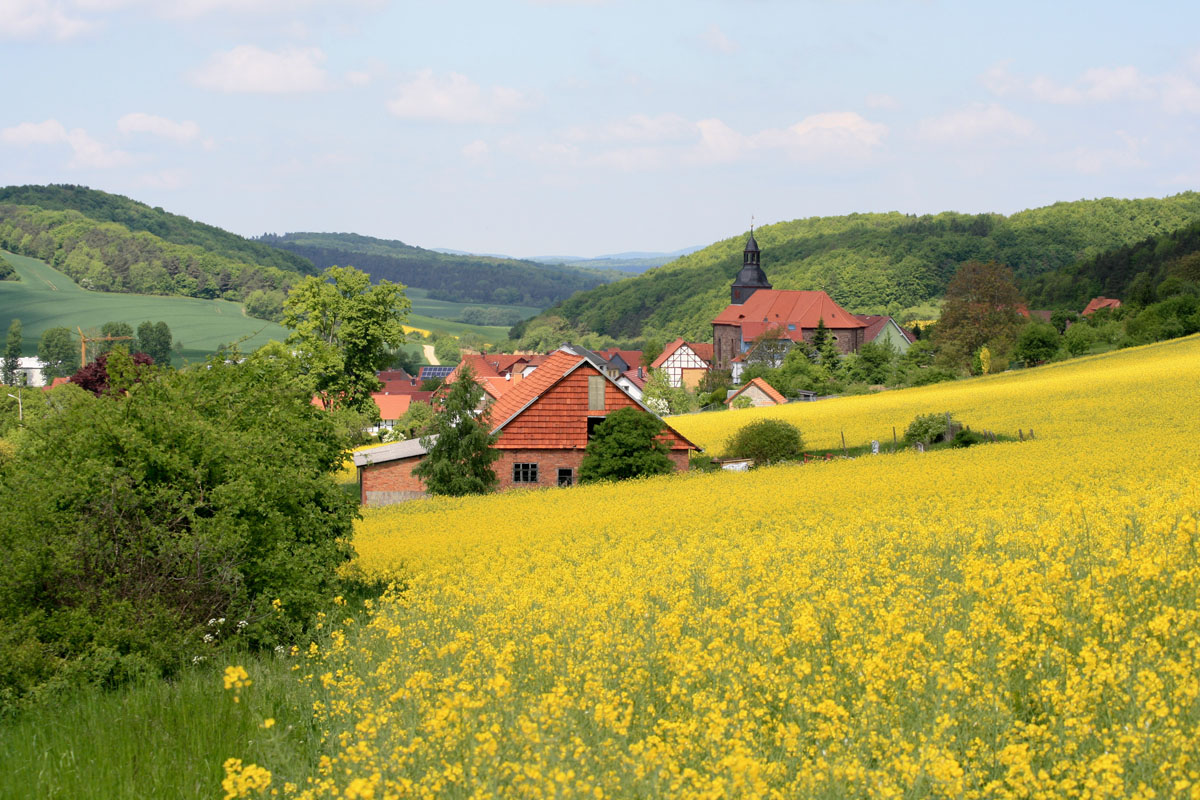 Gerbershausen im Eichsfeld im Sommer 2010 (dahinter links der Wellberg, in der Mitte der Göbelskopf und rechts der Mühlenberg)